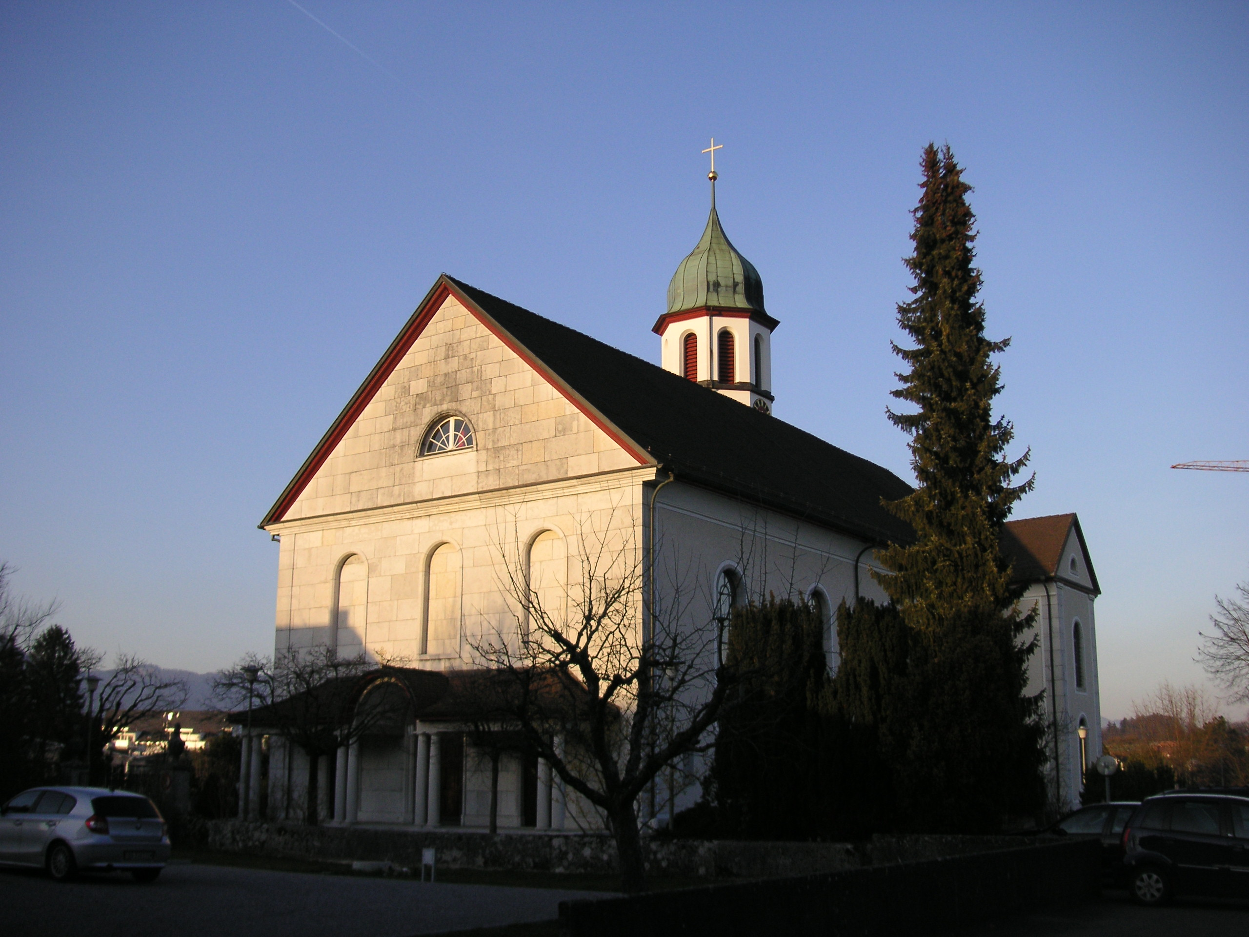 Marienkirche Biberist